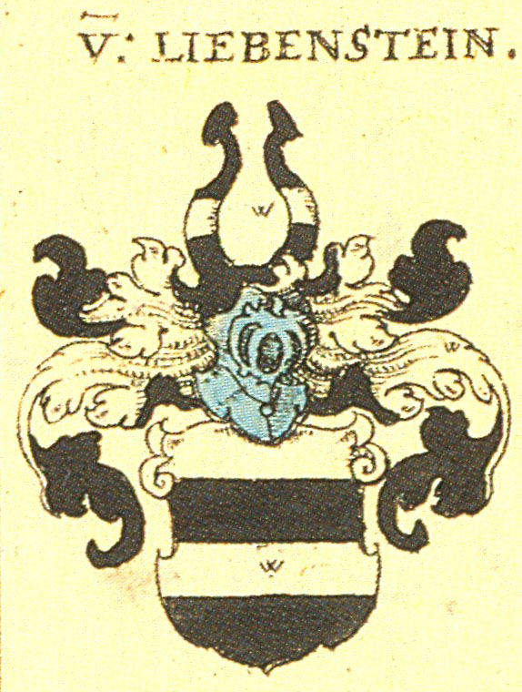 Ritterschaft und Adel in Schwaben von Liebenstein